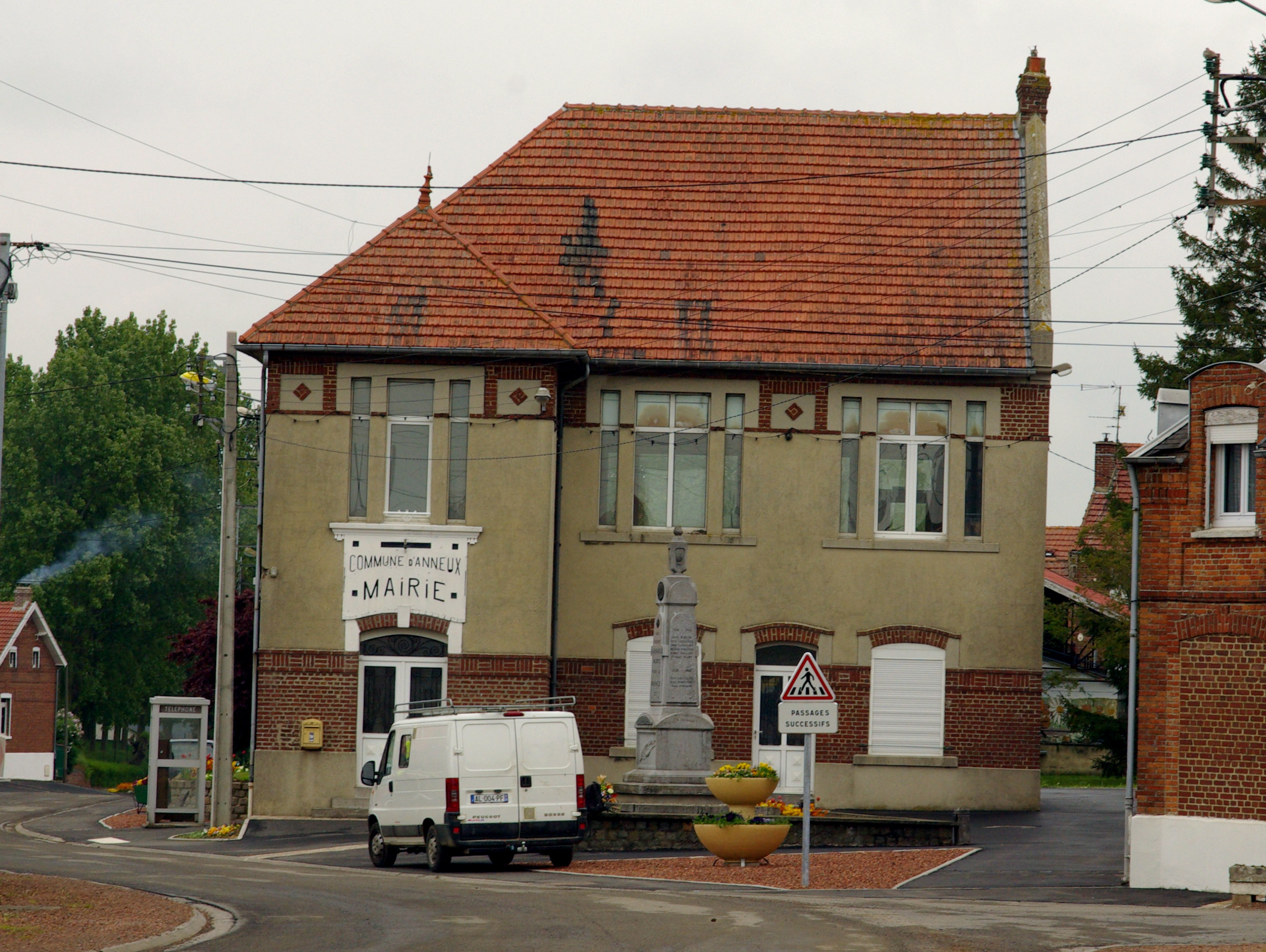 Mairie d'Anneux